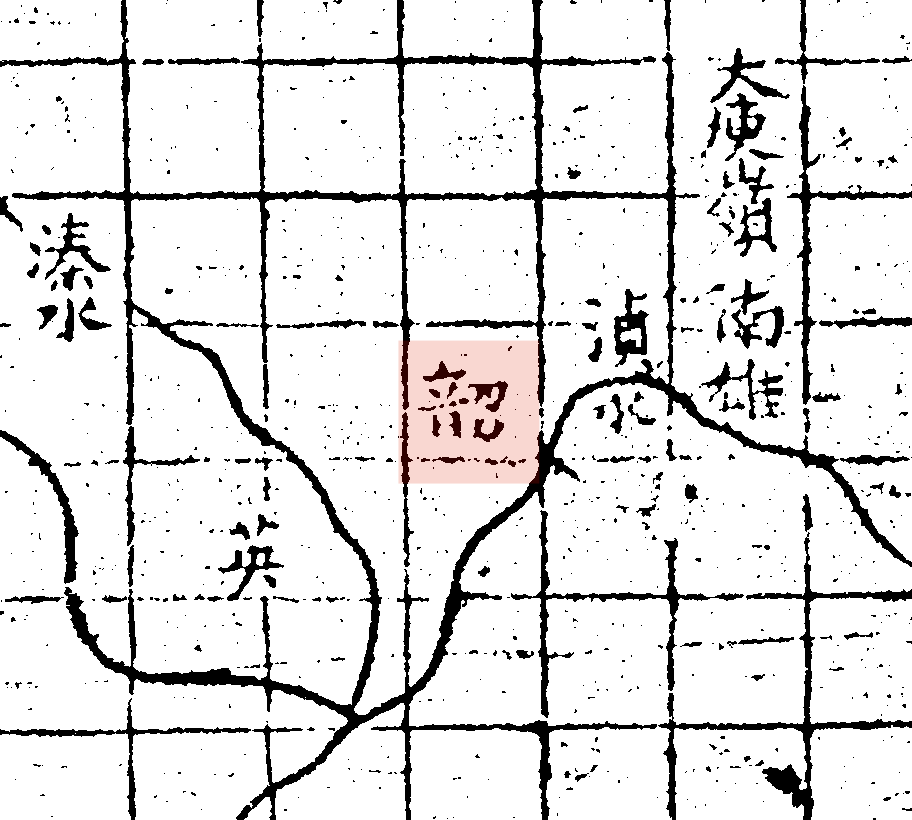 粵語: 禹跡圖中嘅韶州